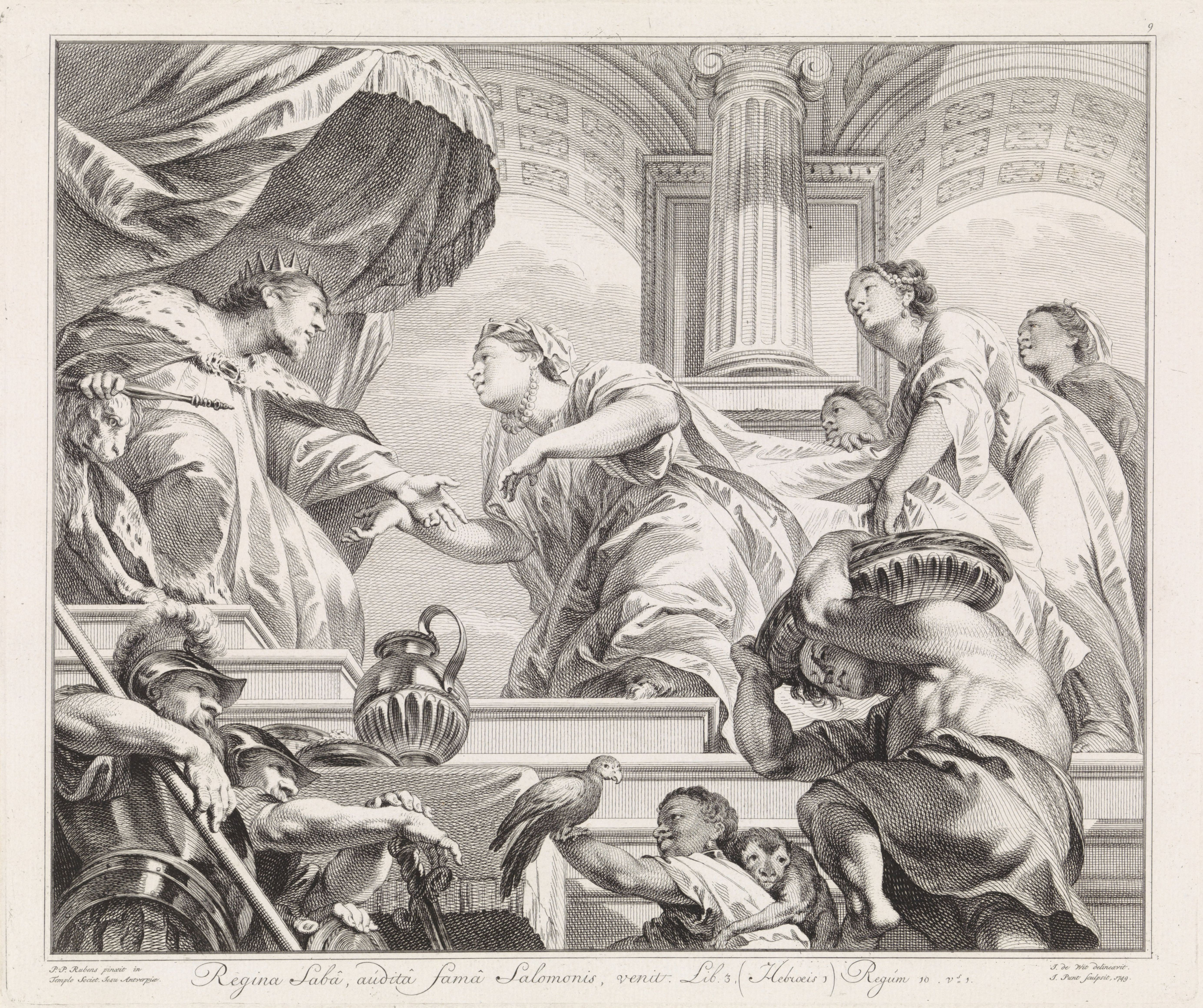 IdentificatieTitel(s): De koningin van Seba stelt Salomo op de proef met raadselsLes plat-fonds ou les tableaux des galeries / De plafonds of gallerystukken (serietitel)Objecttype: prent Objectnummer: RP-P-OB-66.321Opschriften / Merken: verzamelaarsmerk, verso, gestempeld: Lugt 240datum: ‘1749’Omschrijving: Salomo op zijn troon ontvangt de koningin van Seba met haar gevolg. Onder de rechthoekige voorstelling een vers in het Latijn uit 1 Kon. 10:1.VervaardigingVervaardiger: prentmaker: Jan Punt (vermeld op object)naar tekening van: Jacob de Wit (vermeld op object)naar schilderij van: Peter Paul Rubens (vermeld op object)uitgever: Jan PuntPlaats vervaardiging: AmsterdamDatering: 1749Fysieke kenmerken: ets en gravureMateriaal: papier Techniek: etsen / graveren (drukprocedé)Afmetingen: h 336 mm × b 397 mmOnderwerpWat: the queen of Sheba before Solomon, testing him with questionsWaar: Carolus BorromeuskerkVerwerving en rechtenVerwerving: overdracht van beheer 1816Copyright: Publiek domein